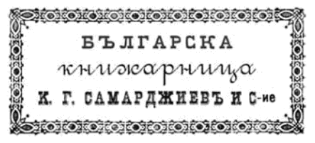 Лого на печатницата на Коне Самарджиев.